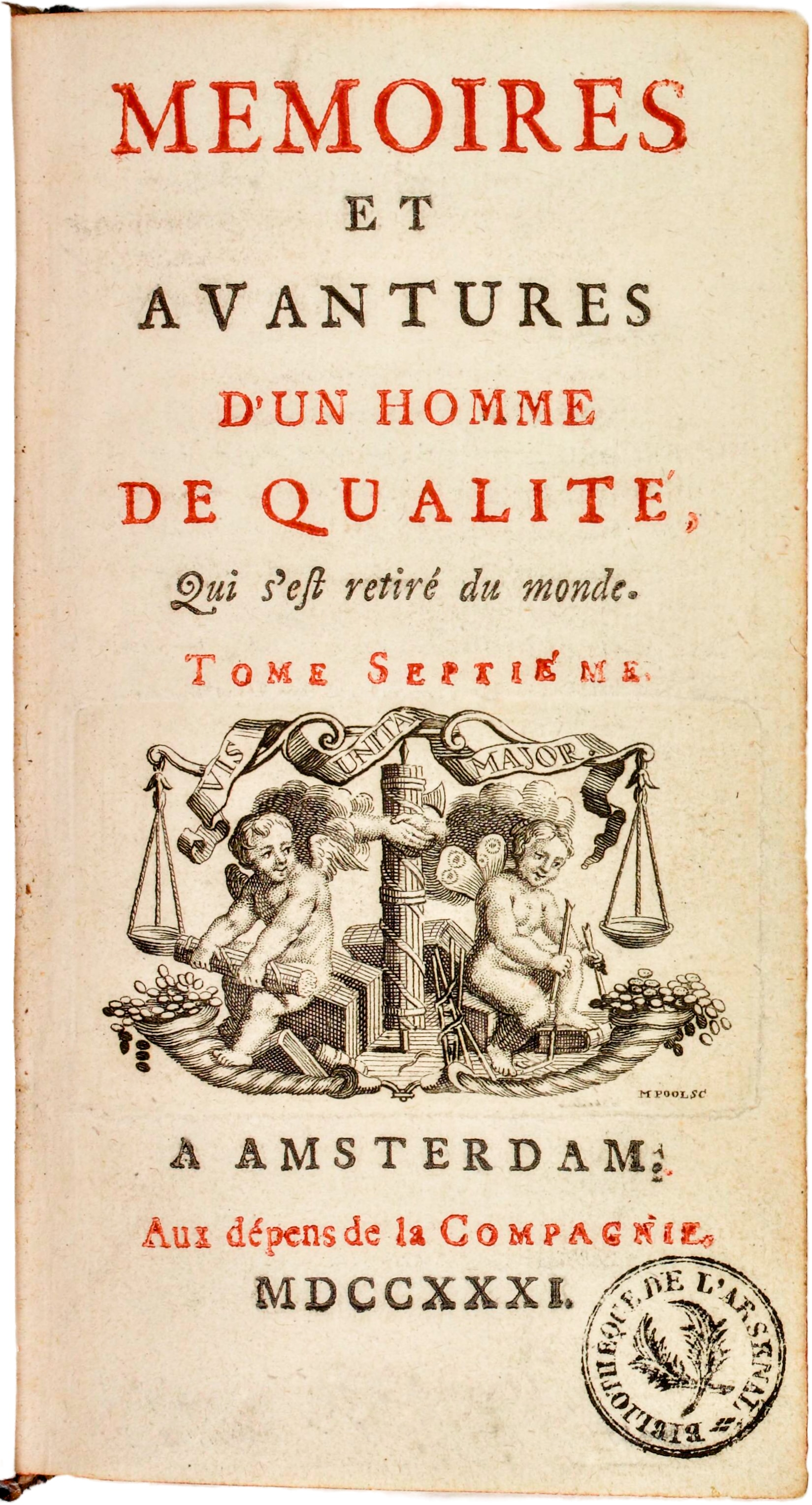 Frontispiece of Abbé Prévost's Memoires et avantures d'un homme de qualité qui s'est retire du monde